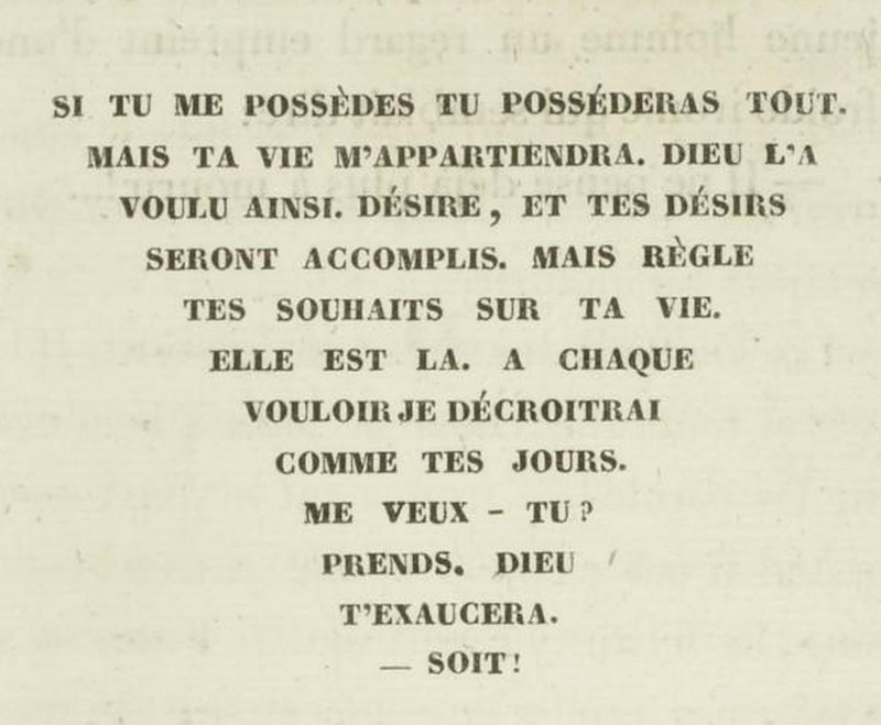 Balzac, La Peau de chagrin. Gallica SI TU ME POSSEDES, TU POSSEDERAS TOUT. MAIS TA VIE M'APPARTIENDRA. DIEU L'A VOULU AINSI. DESIRE, ET TES DESIRS SERONT ACCOMPLIS. MAIS REGLE TES SOUHAITS SUR TA VIE. ELLE EST LA. A CHAQUE VOULOIR JE DECROITRAI COMME TES JOURS. ME VEUX-TU ? PRENDS. DIEU T'EXAUCERA. SOIT !